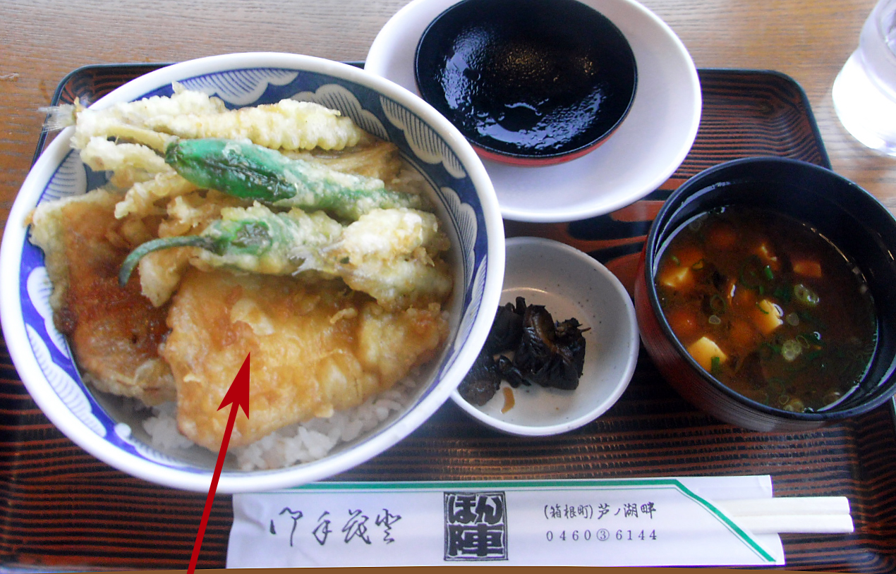 芦ノ湖丼。“ブラックバス(丼手前)、ニジマス(丼左の赤身の魚)、ワカサギ(シシトウの上)の天ぷらが入ったどんぶりです。ブラックバスは普通の白身魚と思いました。単なる天丼としてはお高め。観光地価格にしても通常の天丼より高いです。まあ、一度食べれば二度はないかと。” Ricoh Caplio R6